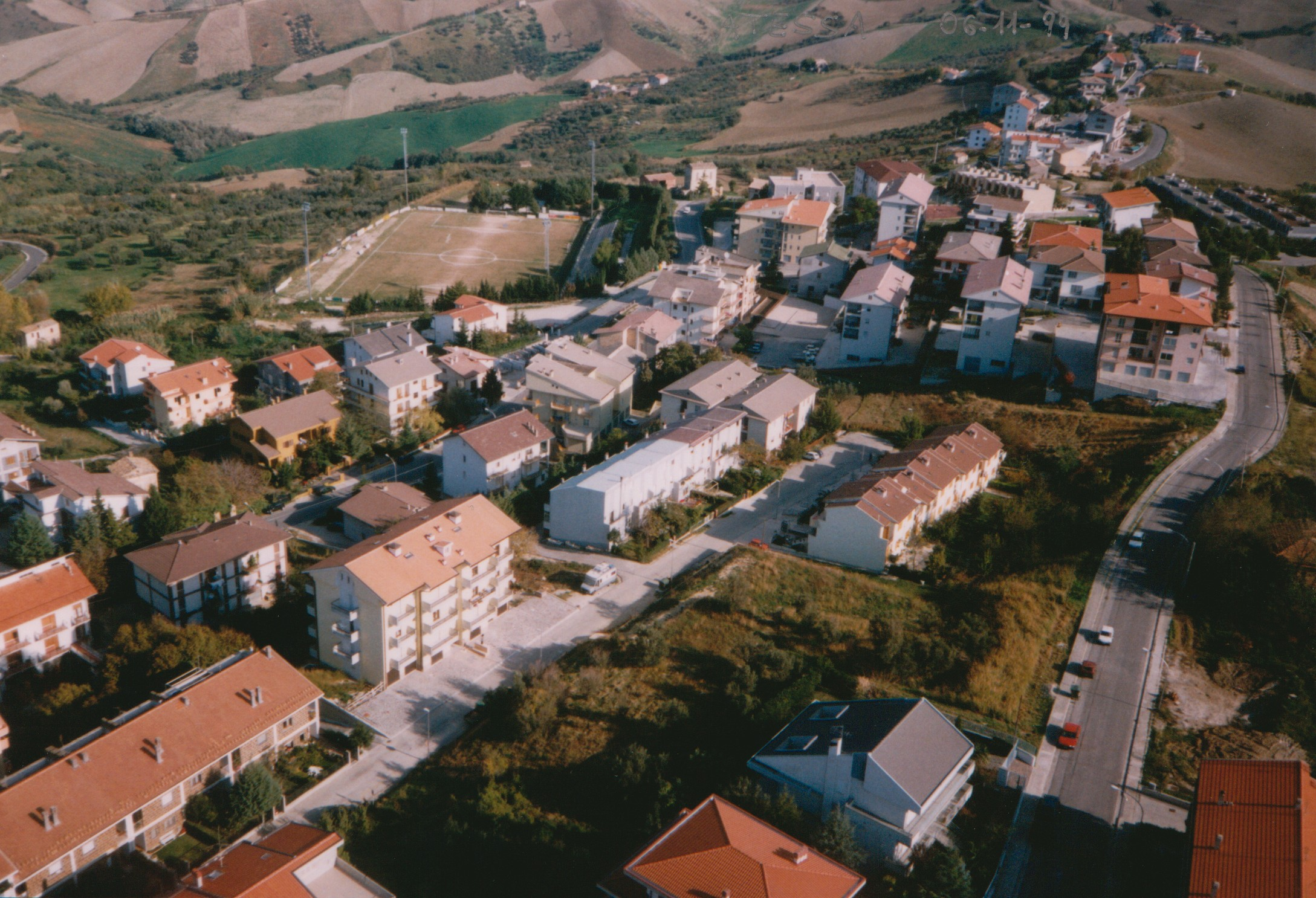 foto dall'alto Via Panoramica autore: Intilangelo Roberto